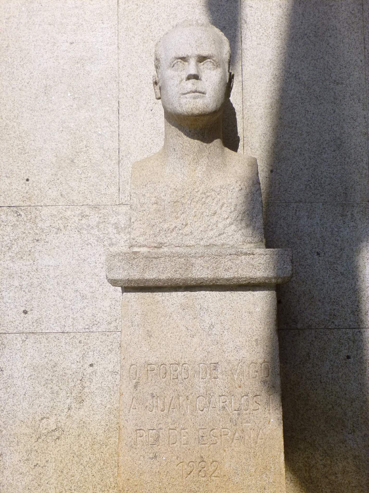 Vigo - Concello (Ayuntamiento)